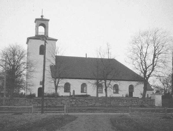 Nässjö gamla kyrka